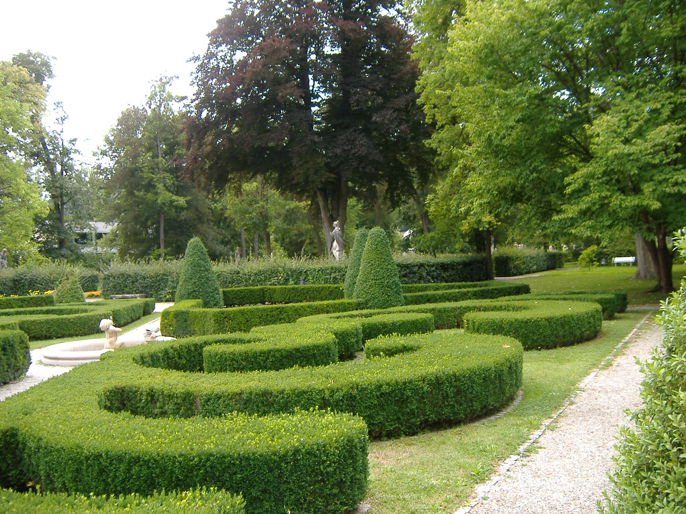 Barockgarten im Hofgarten Eichstätt